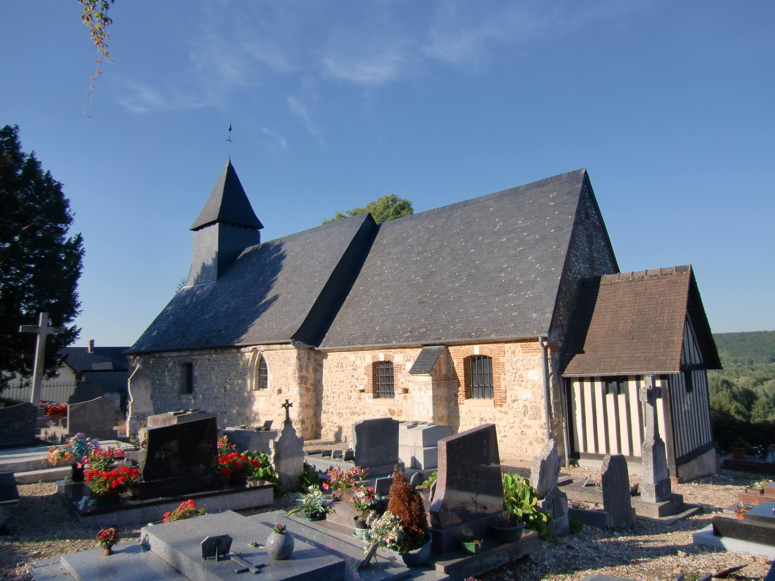 église de Saint-Sulpice-de-Grimbouville (Eure, Normandie, France)